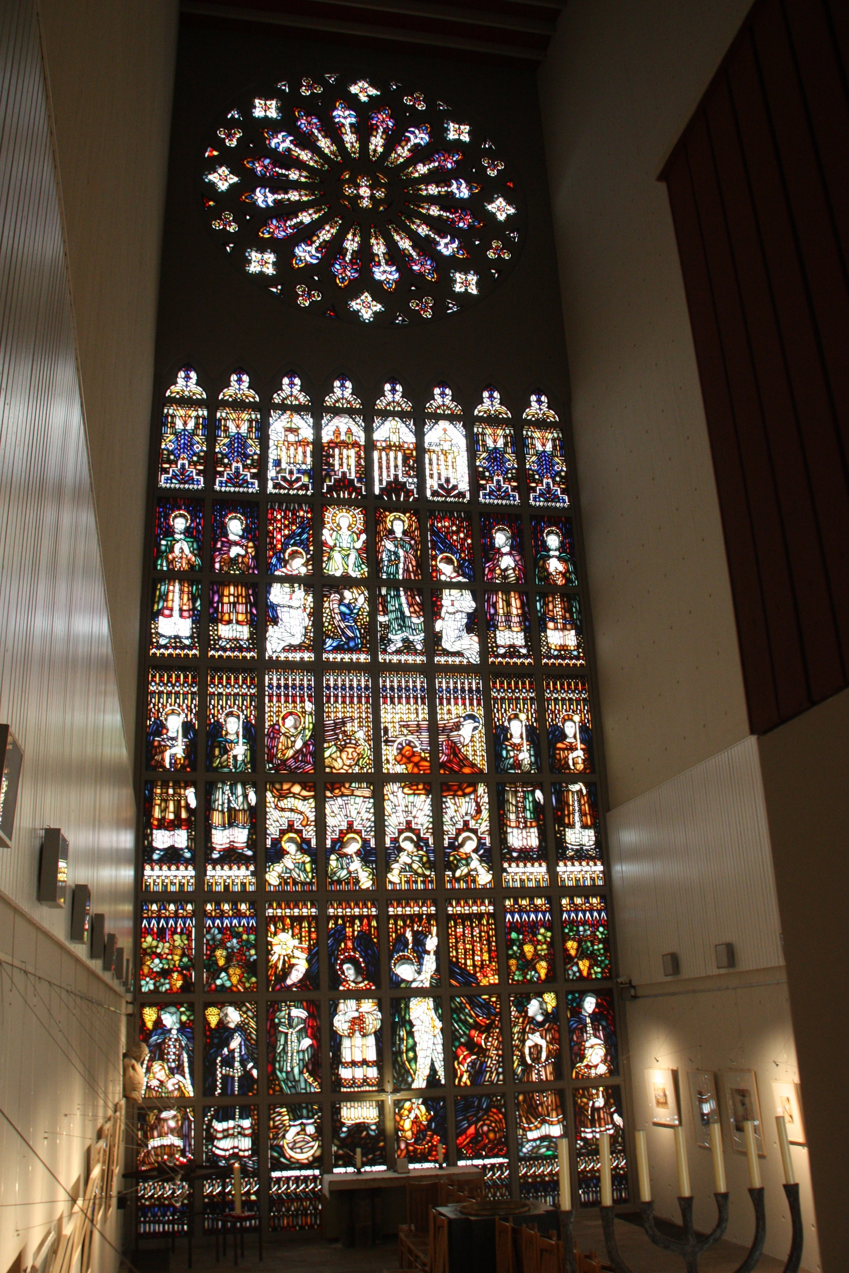 Hamburg, Neue Sankt Nikolai-Kirche, Harvestehude, Hauptfenster von Elisabeth Coester